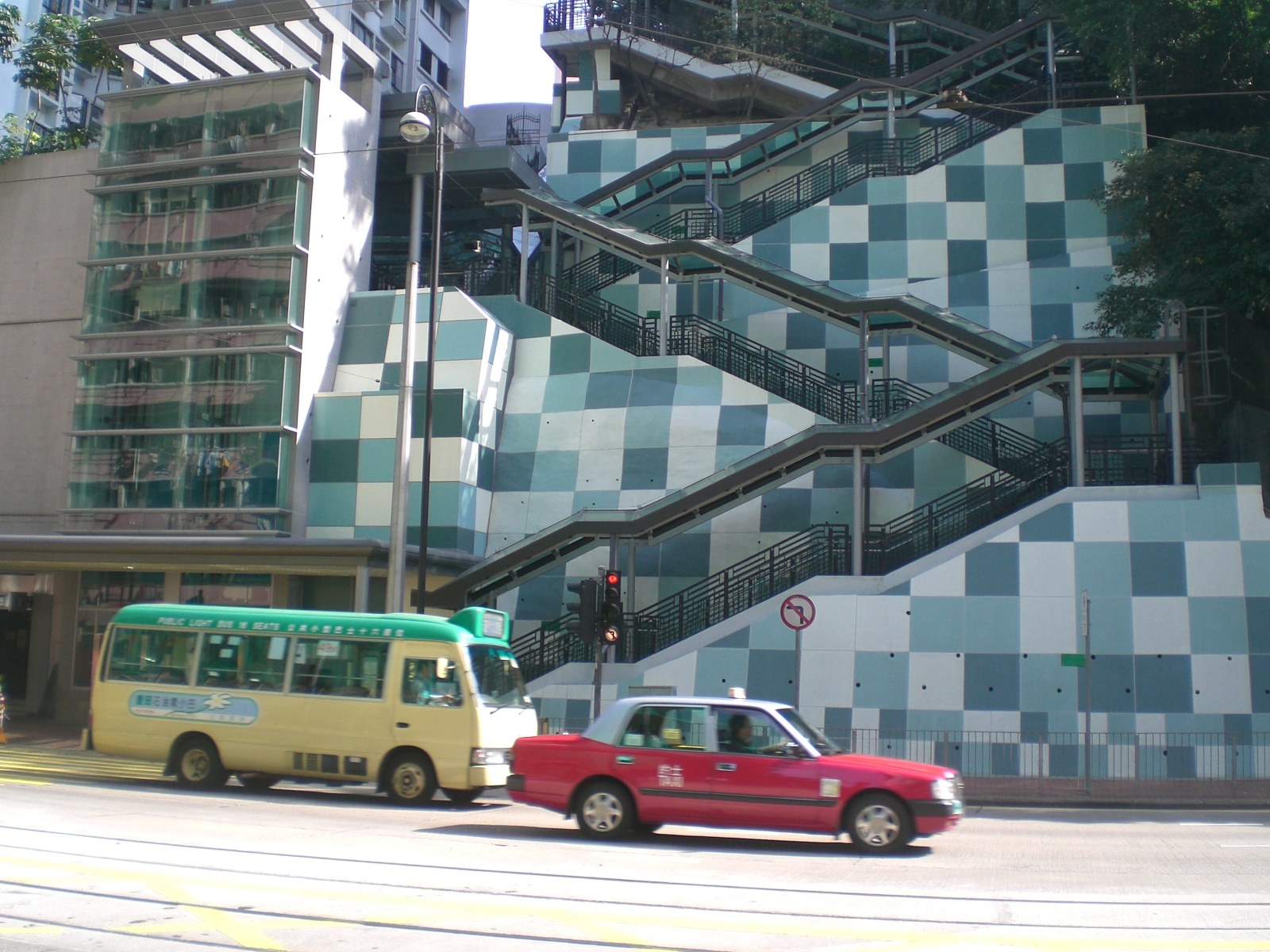 英皇道新建成的石樓梯近炮台山站油街出口